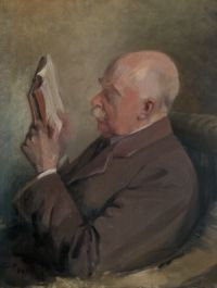 Apponyi Sándor ábrázolása kedvenc foglalatossága közben.